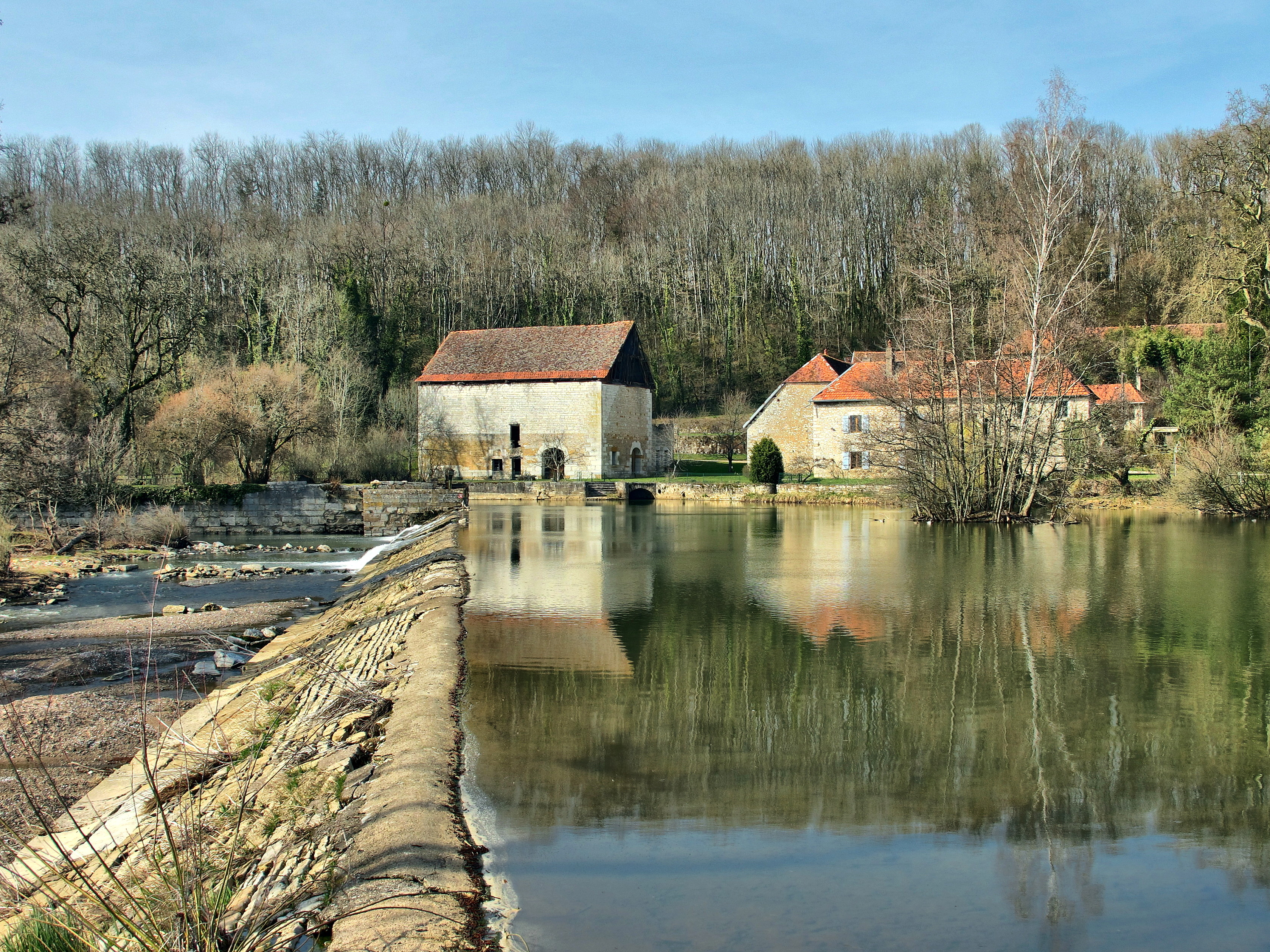 Inscrit aux monuments historiques sous le numéro PA25000013